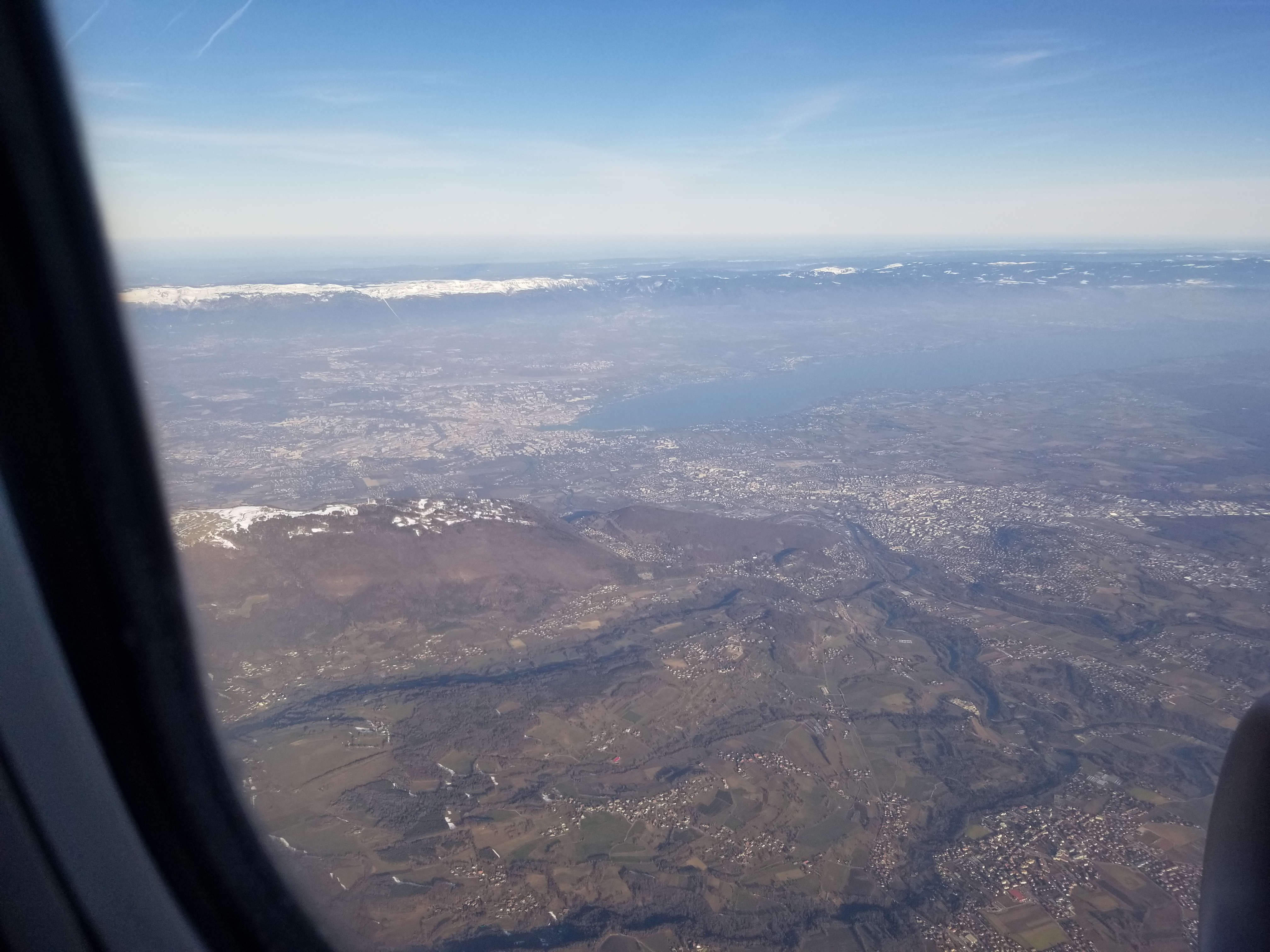 ז'נבה בצילום מהאוויר